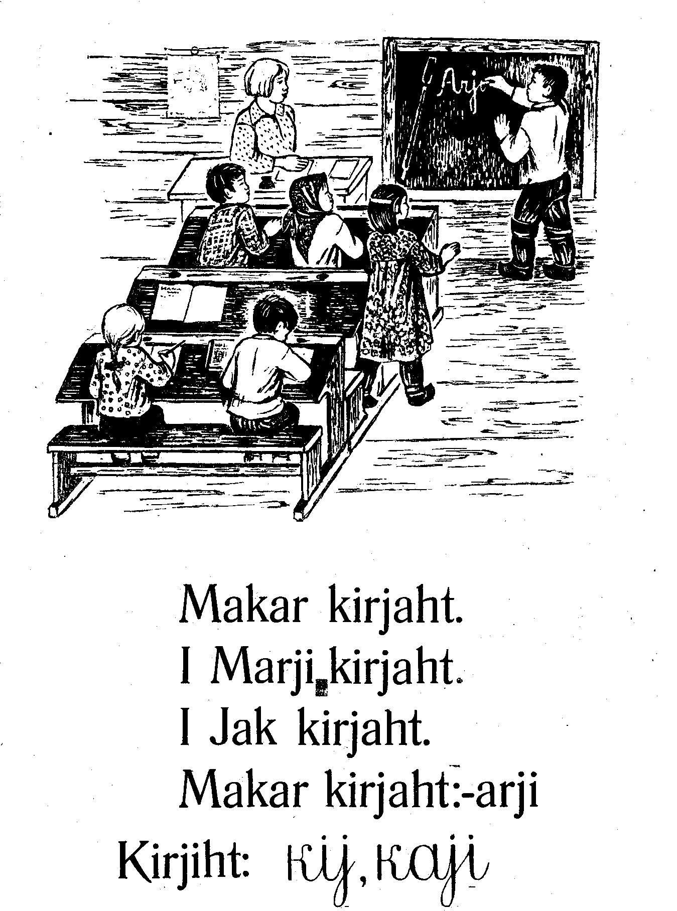 Classroom at the Sami-language school. An illustration from Saam bukvar. Unknown artist. Moscow-Leningrad: Uchpedgiz, 1933.